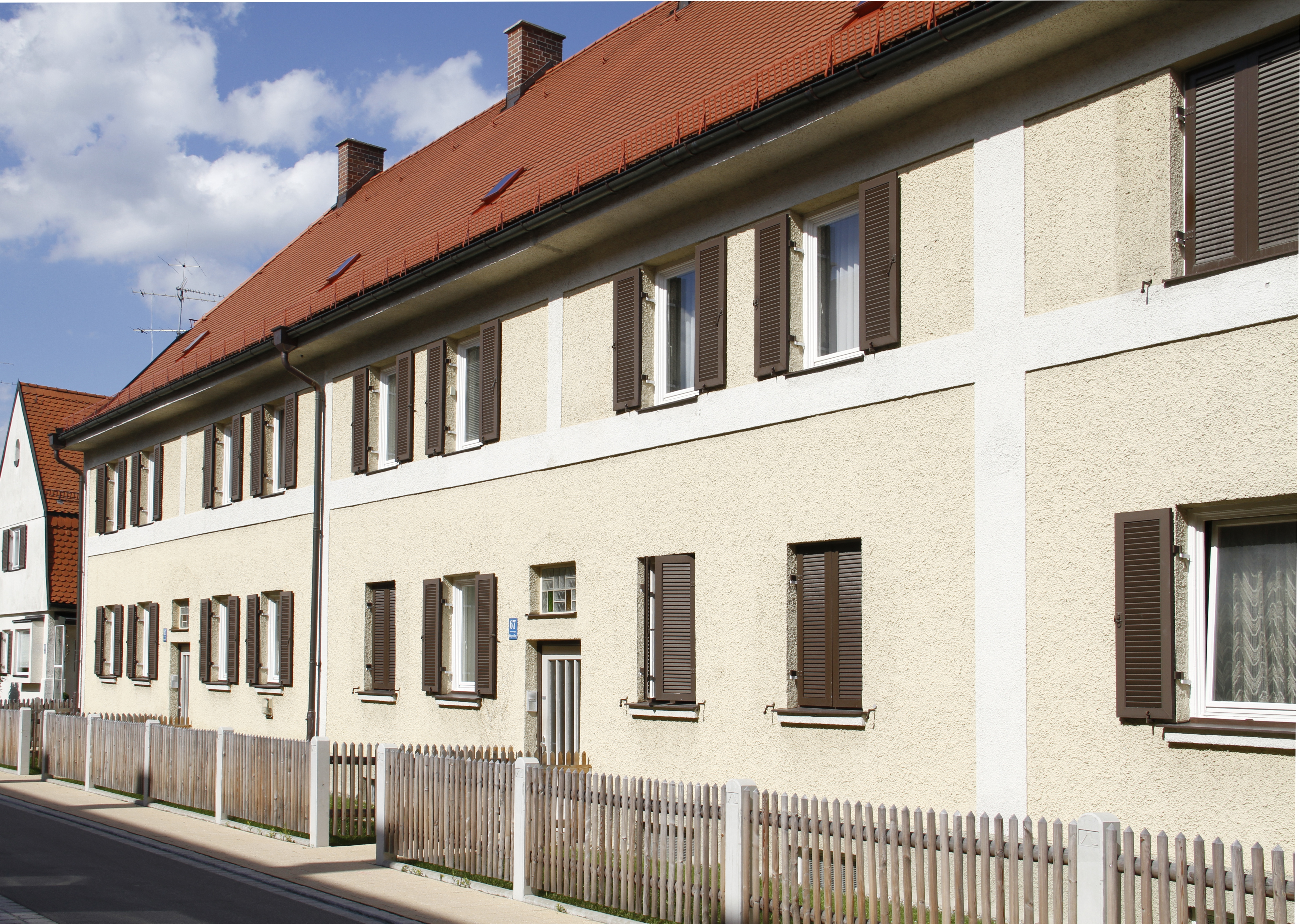 Kriegersiedlung in München, errichtet bis 1927. Vierfamilien-Haus aus dem Bauabschnitt 3